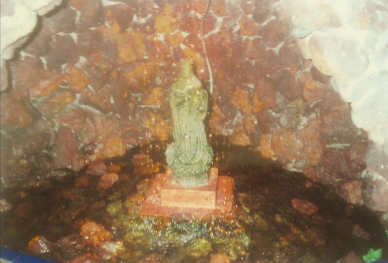 Estatuilla de la Virgen María y fuente adosada a un muro exterior de la Catedral de Matamoros